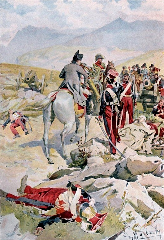 Somosierra, 30 novembre 1808. Napoléon discute avec les survivants ayant participé à la charge du 3e escadron des chevau-légers polonais de la Garde contre les positions espagnoles.